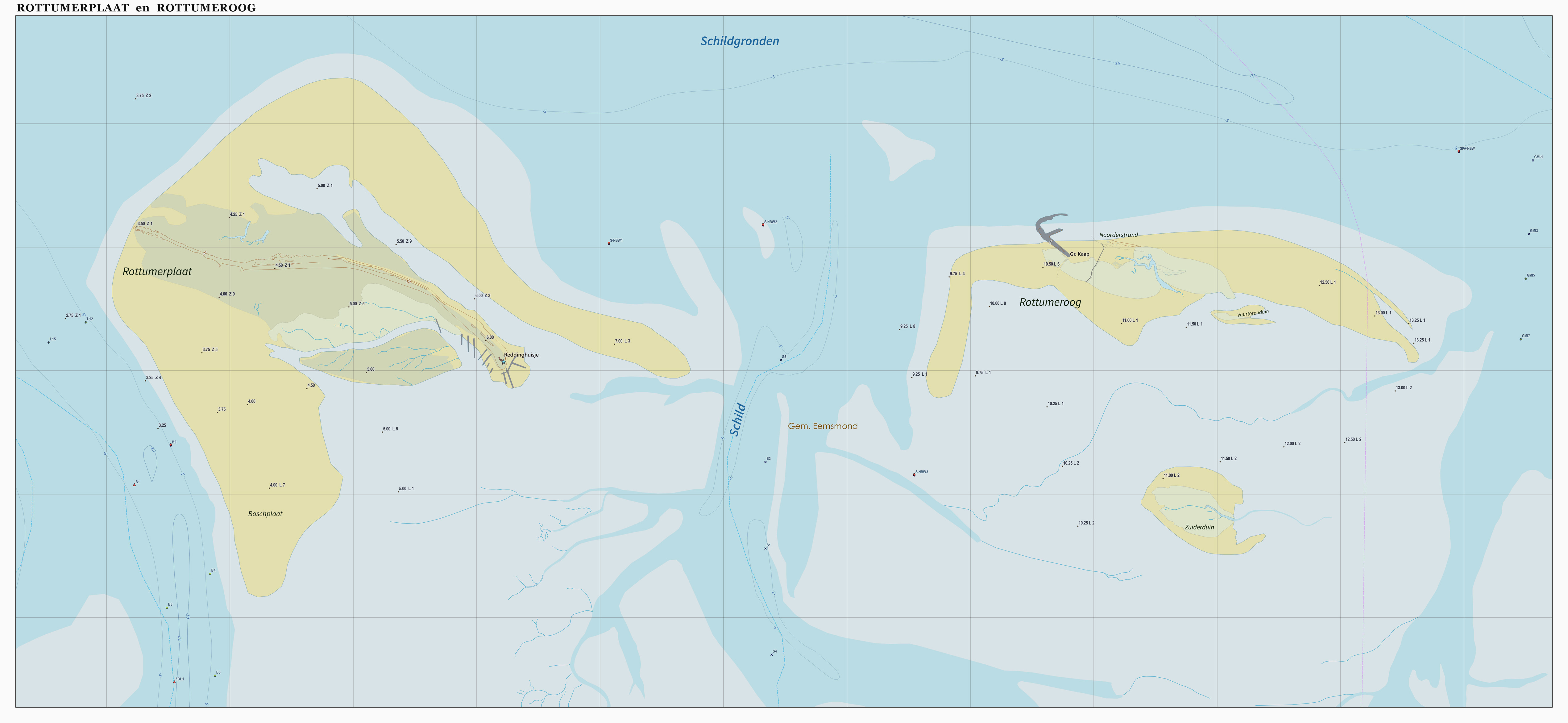 Topografische kaart van Rottummerplaat en Rottumeroog. Resolutie: 400 pixels/km. Samengesteld door Jan-Willem van Aalst op basis van de GML open geodata van de BRT/Top10NL (basisregistratie Topografie, Kadaster), vrijgegeven door Kadaster onder de Creative Commons BY licentie. Additionele gegevens uit BAG uit de Open Street Map en uit de Risicokaart. Zie ook de Legenda.